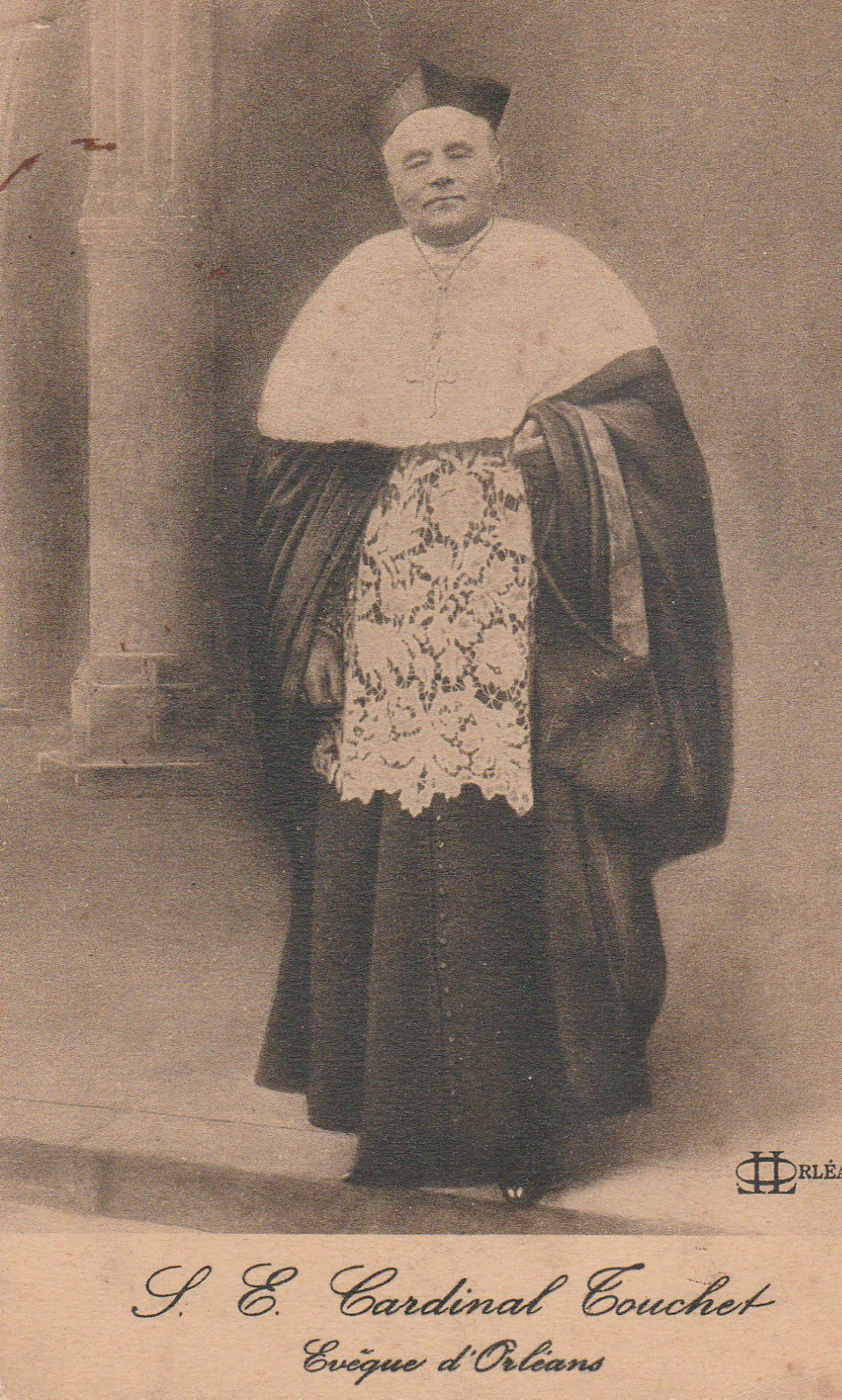 Carte postale ancienne représentant le cardinal Touchet (1848-1926), évêque d'Orléans.